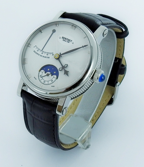 montre mécanique à complications réserve de marche et phase de lune, petite seconde 43mm .16 1/2-6498 Berthet